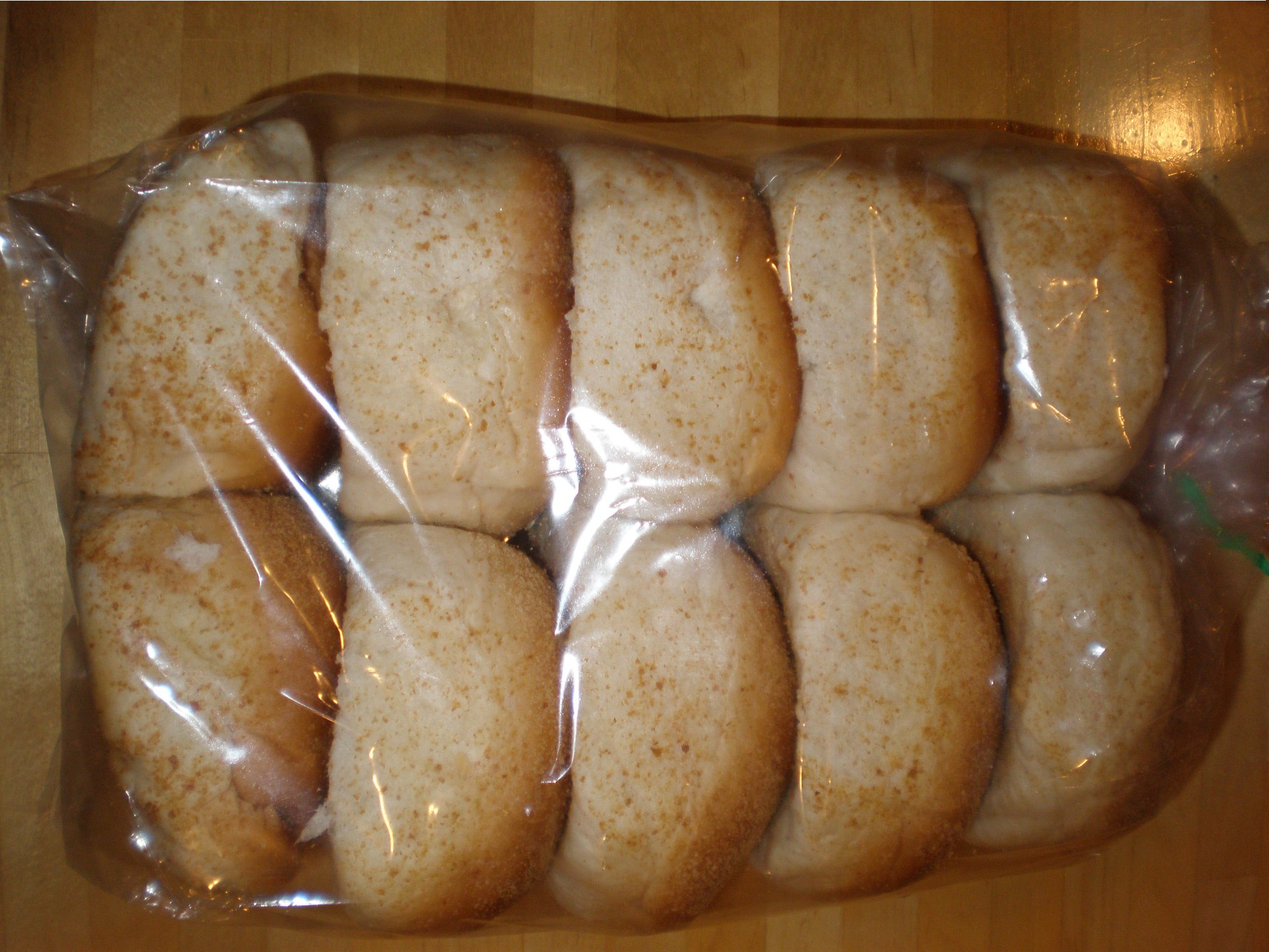 A bag of pandesal